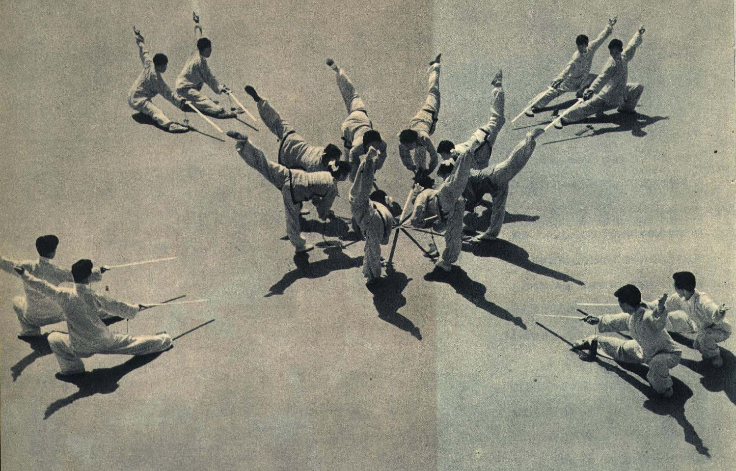 1962-01 1962年 武术